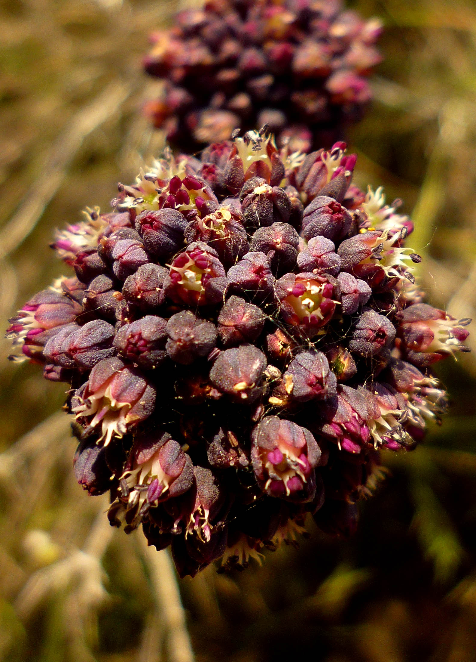 Allium melananthum en Cartagena (España)